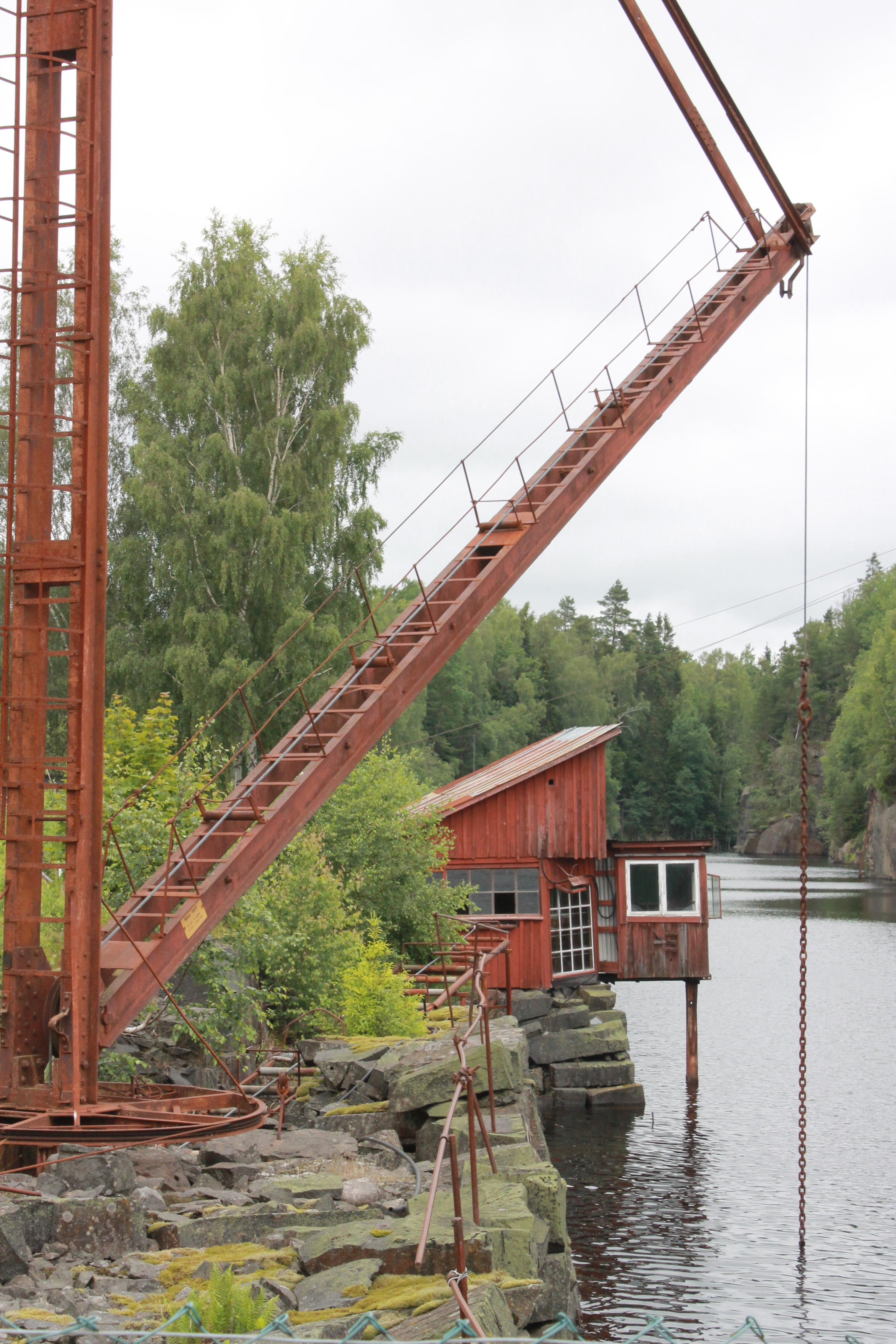 Kran i Svarta bergen (Hägghult) stående